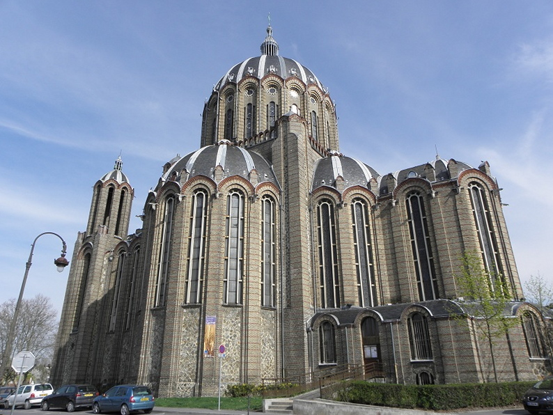 Basilique Sainte-Clotilde de Reims (51).